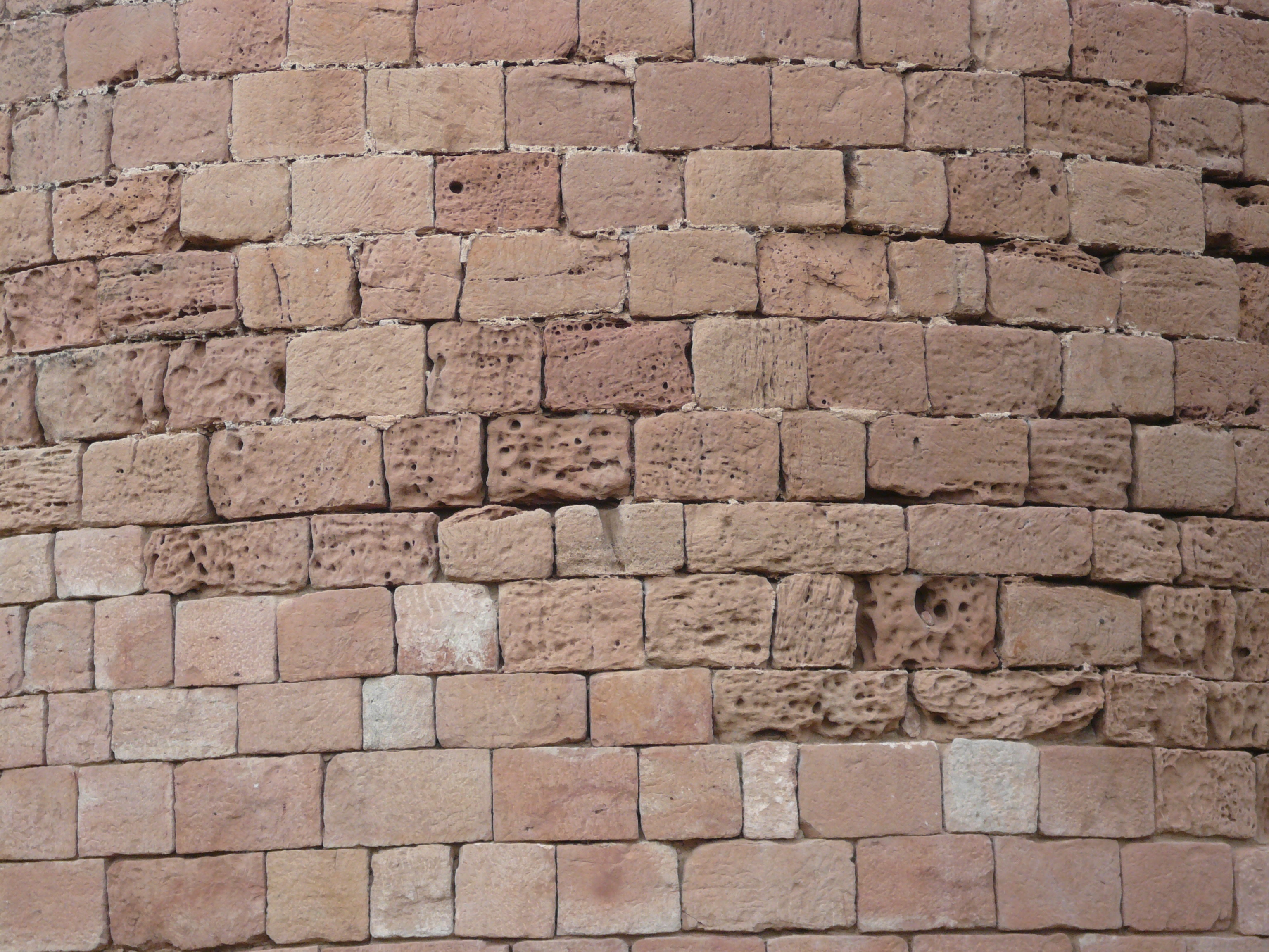 Torre del castell de la Manresana (els Prats de Rei) Object location41° 41′ 48.33″ N, 1° 33′ 07.38″ E